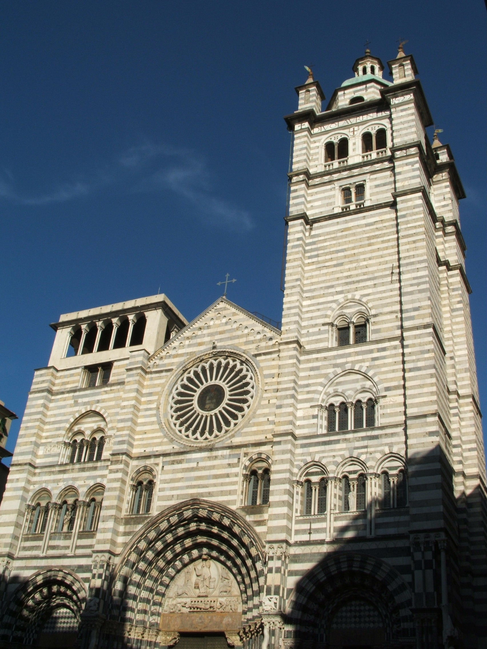 Facciata della cattedrale di San Lorenzo a Genova.